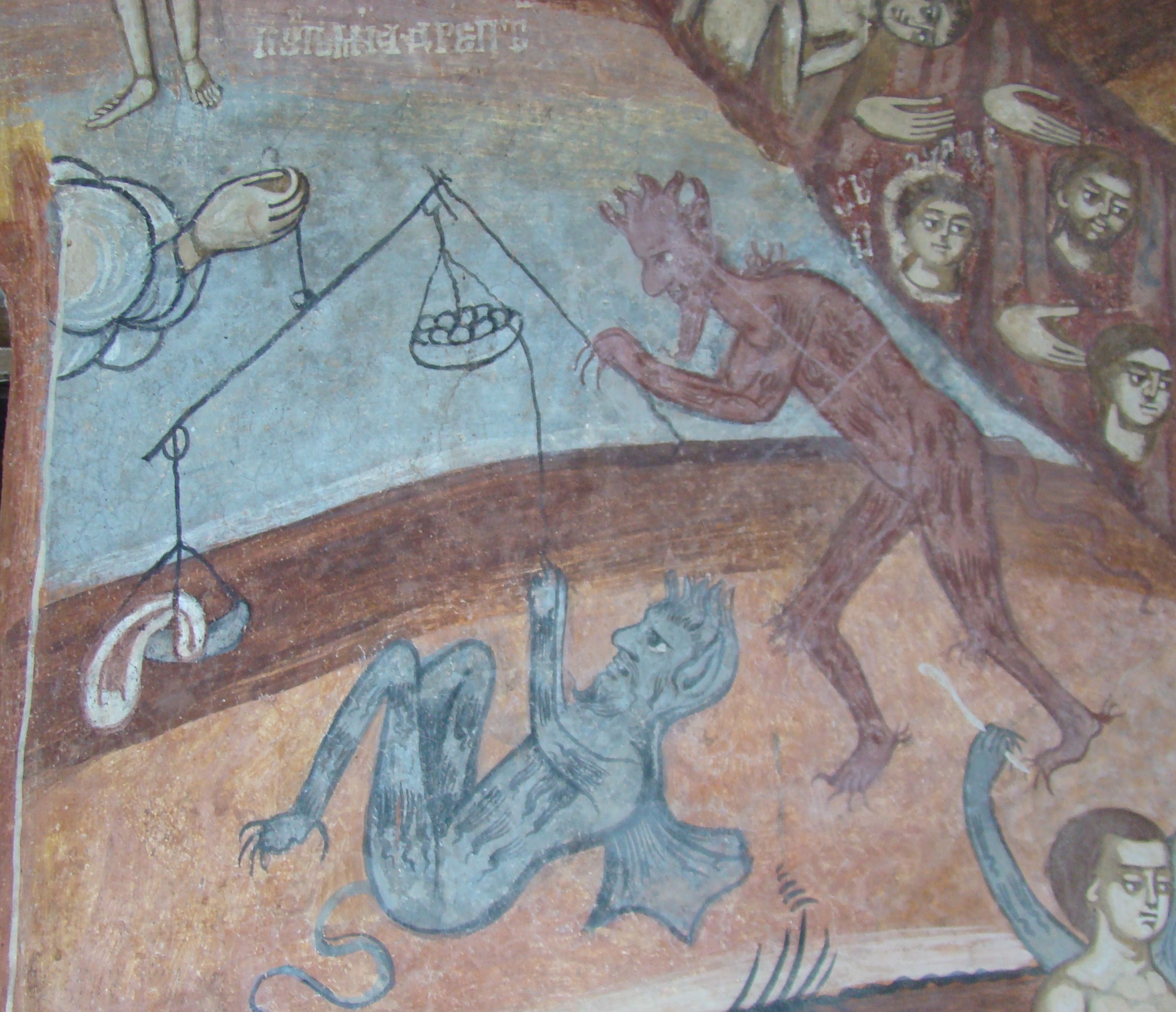 Biserica „Sfinţii Ioachim și Ana”, sat Târgu Logrești; comuna Logrești 01